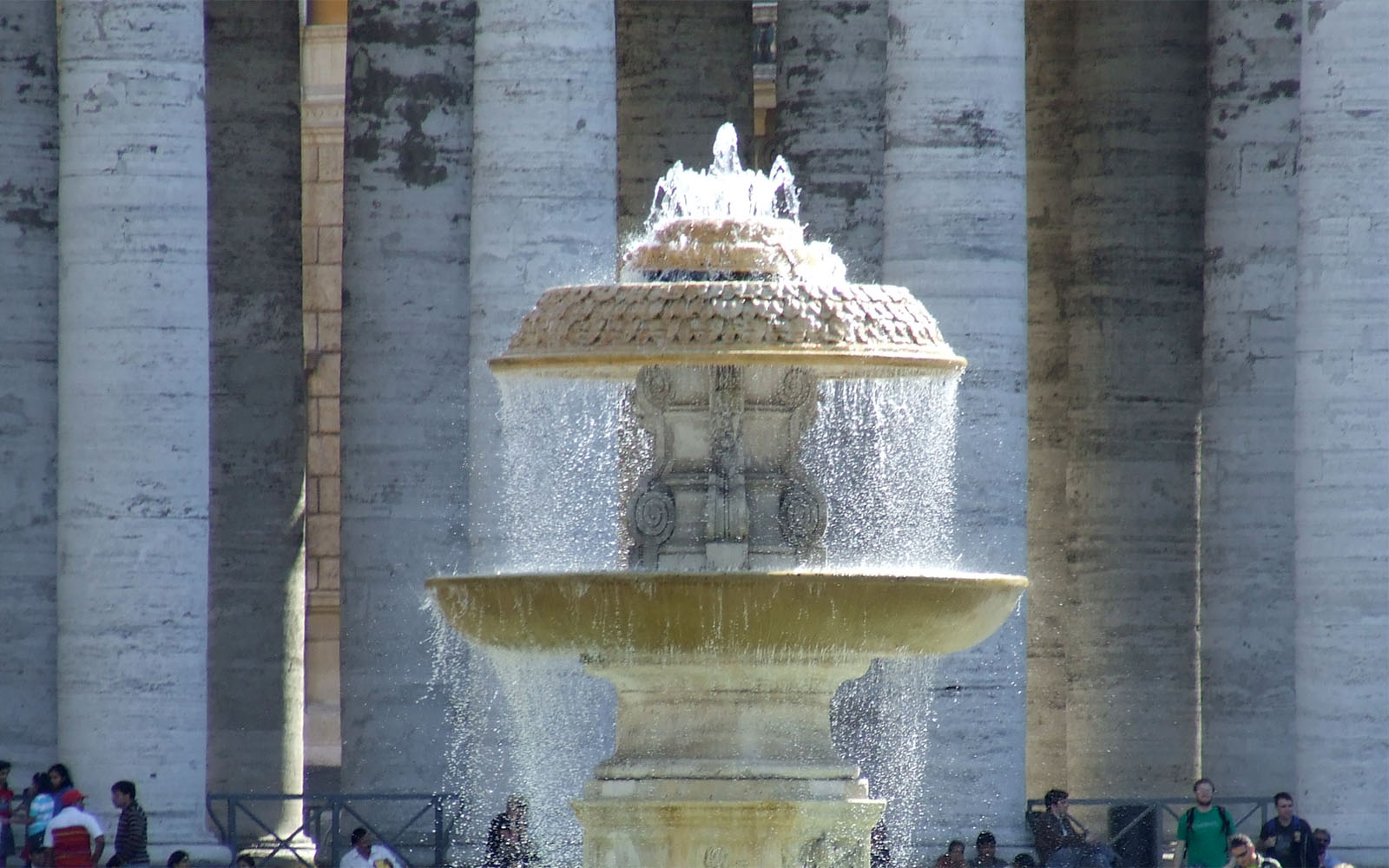 Piazza San Pietro, Roma, Vaticano, Fontana lato sud